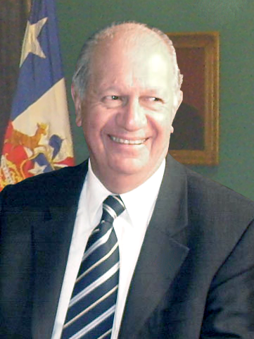 Ricardo Lagos Escobar en 2006